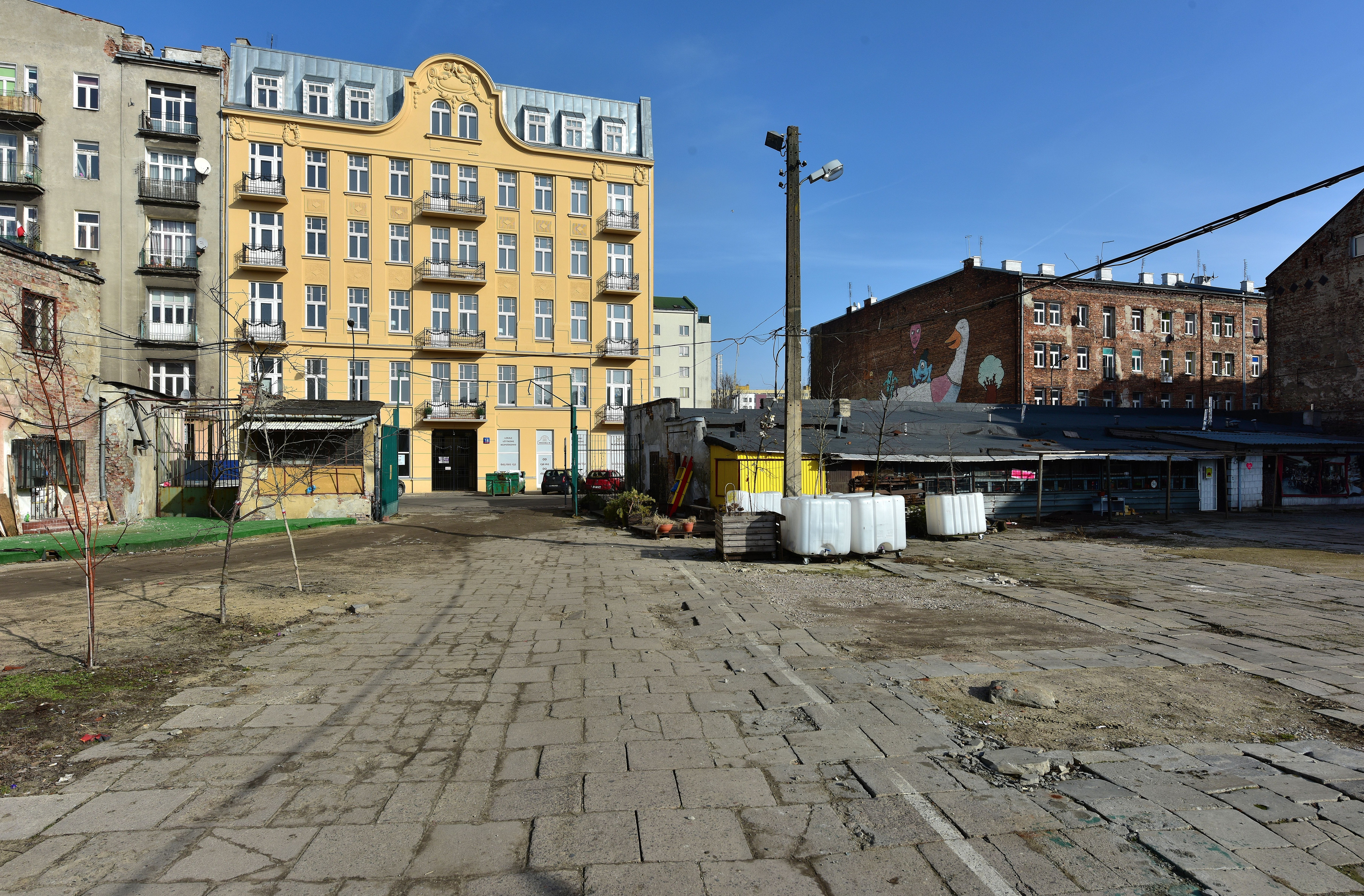 Widok z bazaru Różyckiego w kierunku ul. Brzeskiej w Warszawie